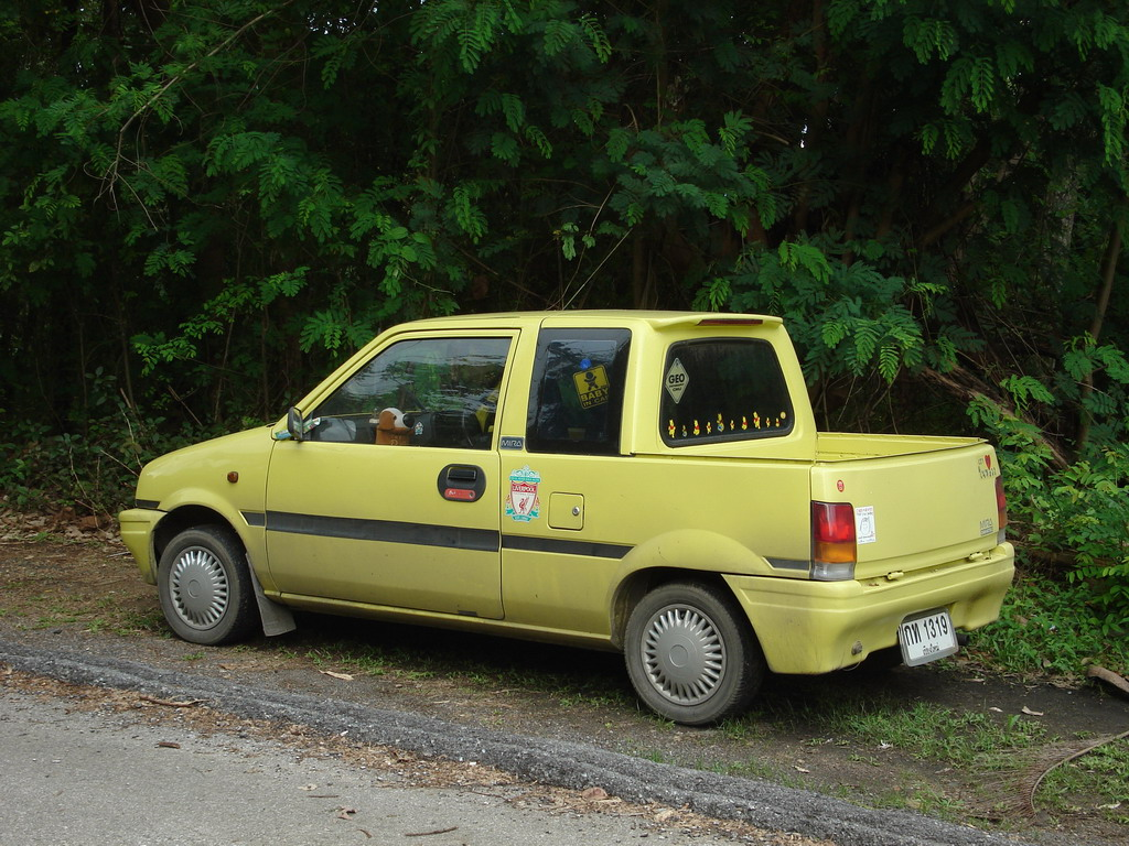 Daihatsu Mira (Thai built "Miracab")